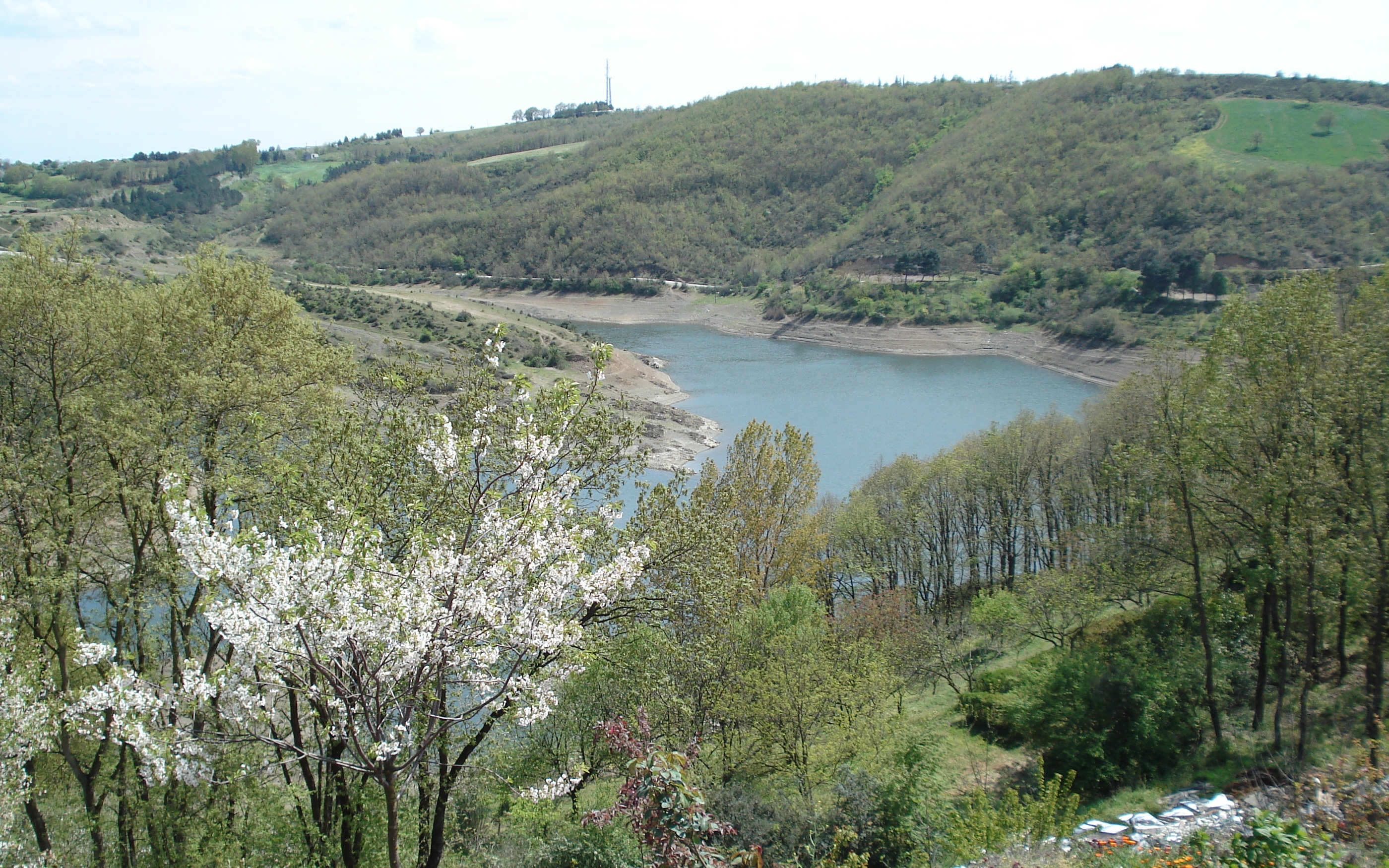 Ömerli Baraj Stausee in Istanbul/Pendik